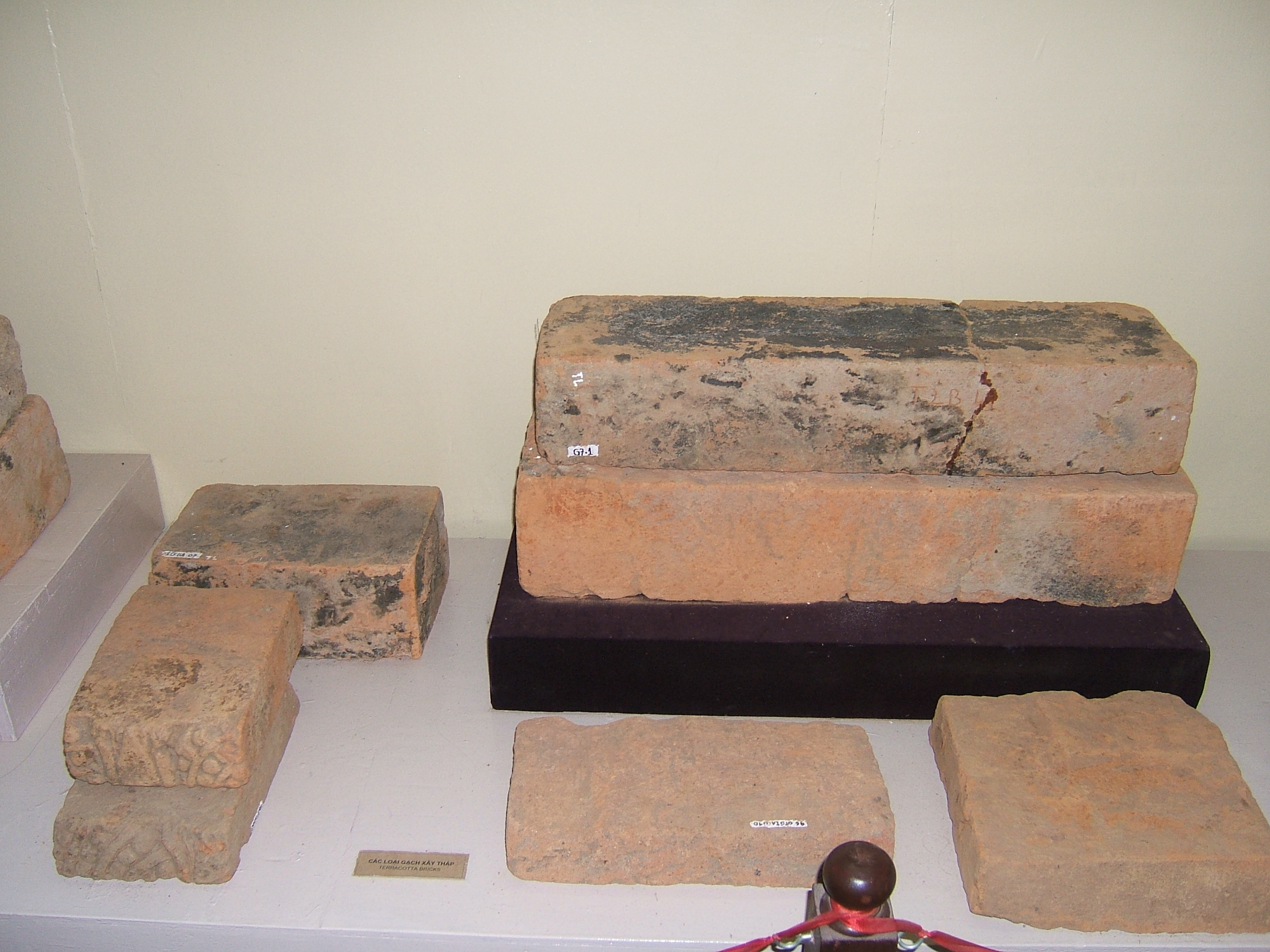 Các loại gạch xây tháp tại Thánh địa Cát Tiên, Lâm Đồng, Việt Nam Đồng Terracotta bricks in Cát Tiên sanctuary, Lâm Đồng province, Việt Nam